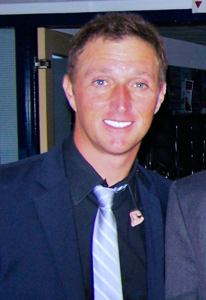 bariton Doug Anderson